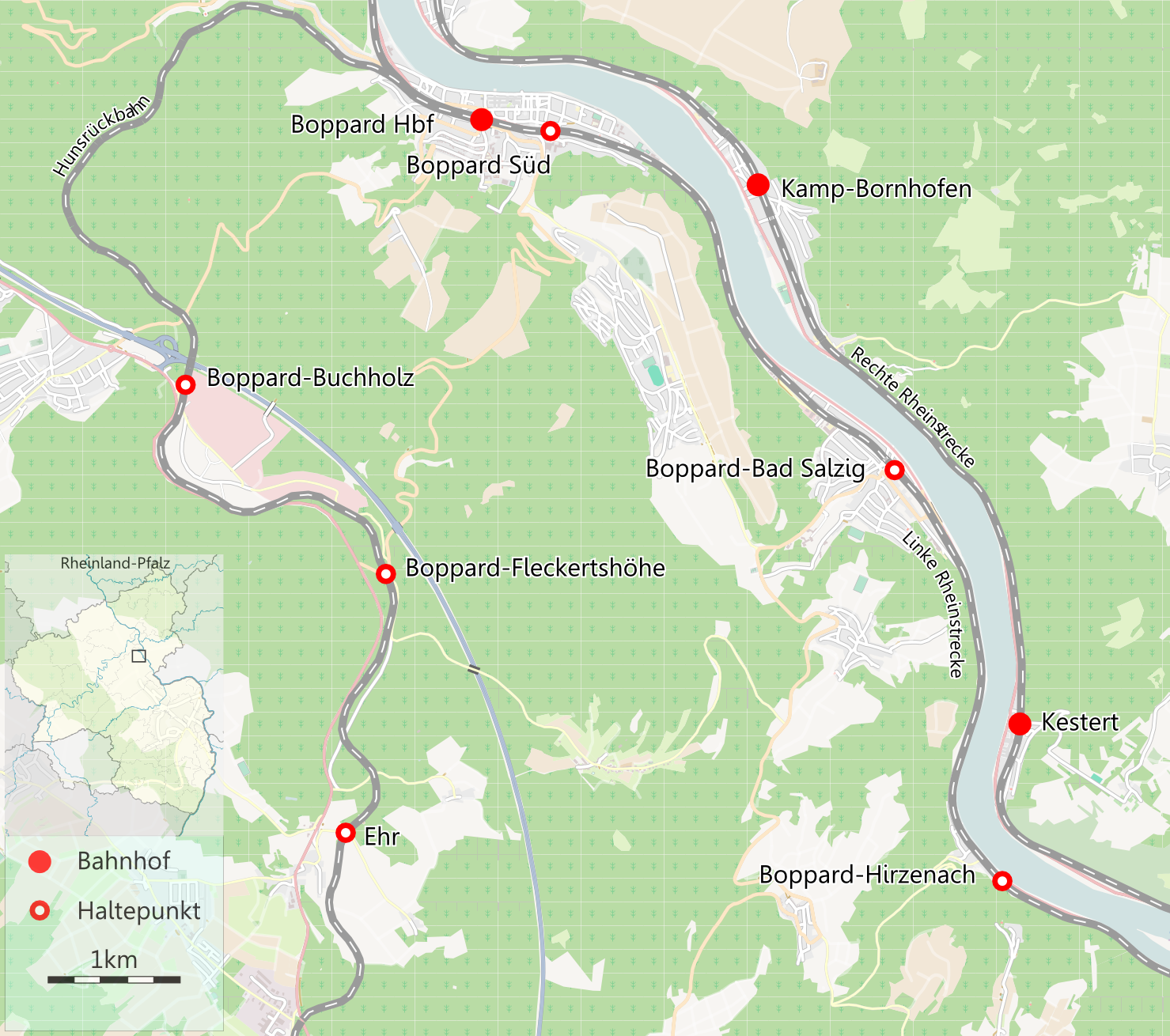 Karte mit Bahnhaltepunkten in Boppard und Umgebung